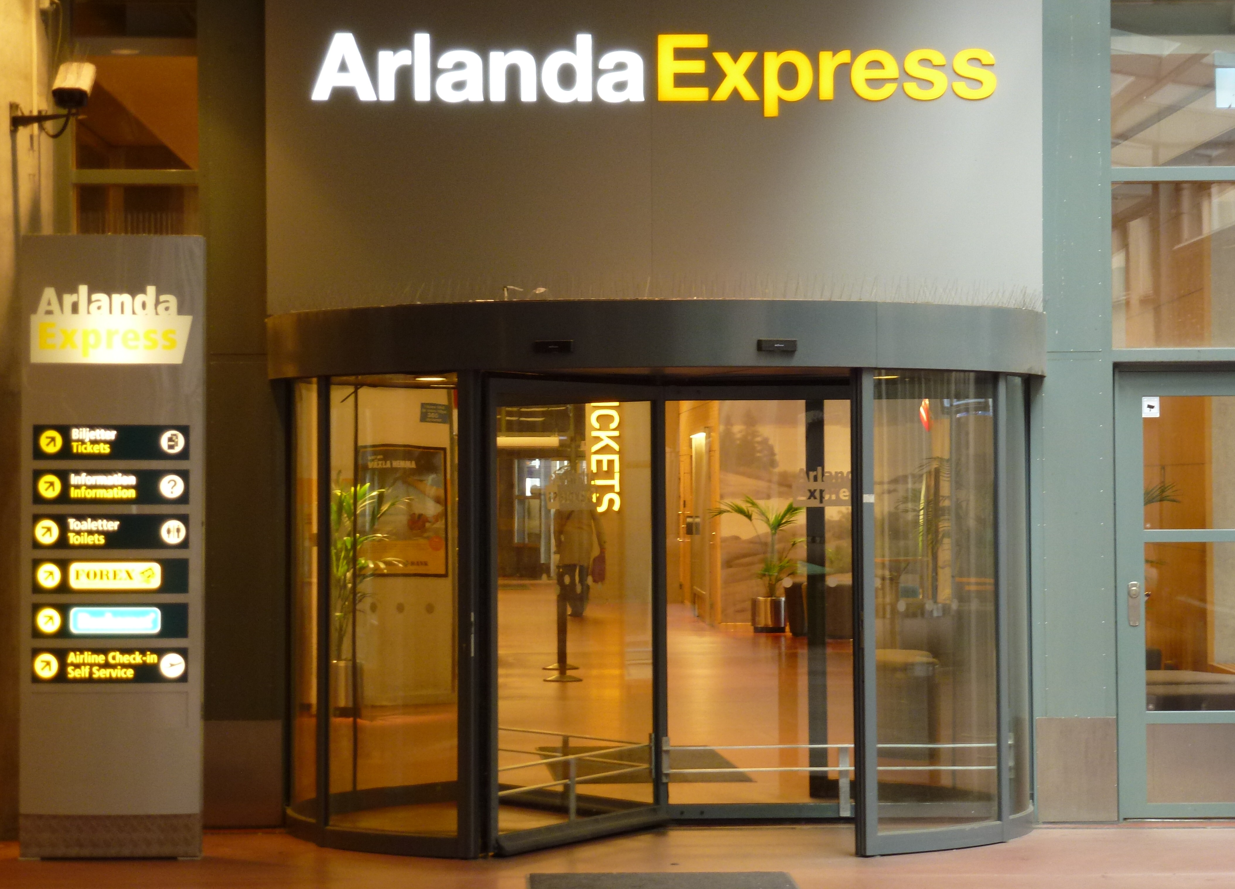 Arlanda Express på Stockholms central